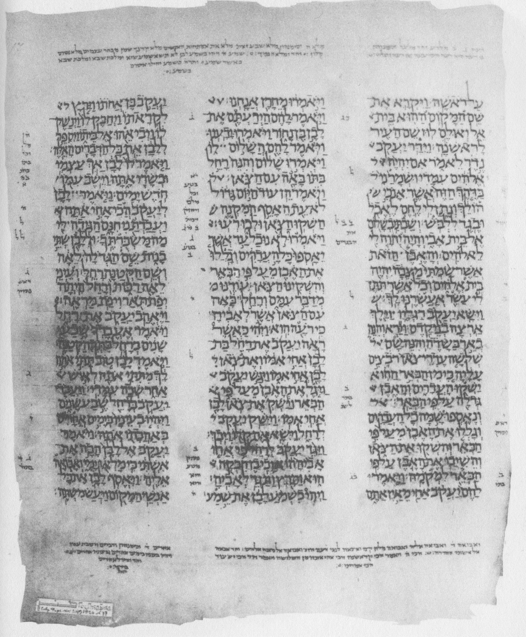 Codex Leningrad